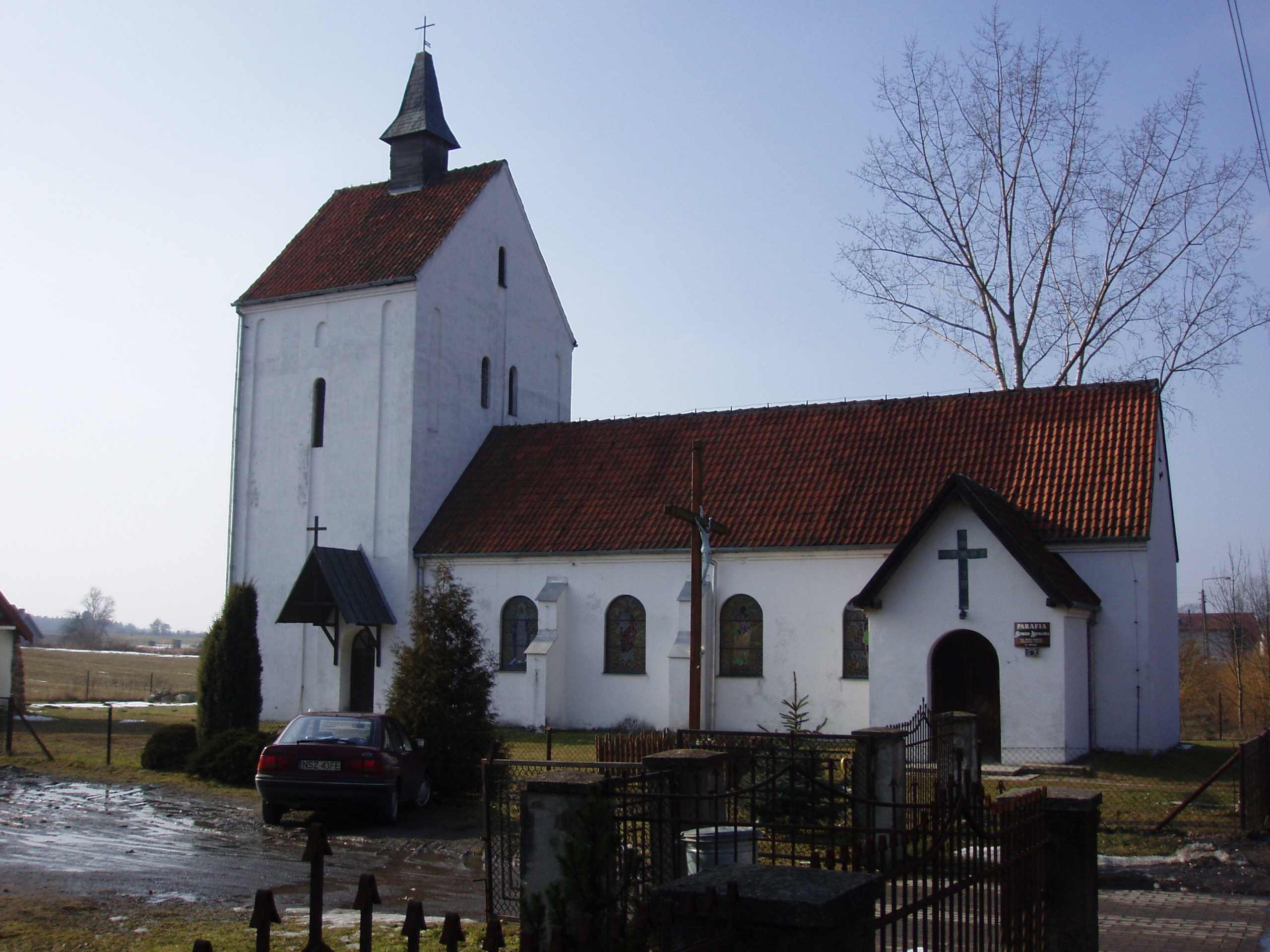 kościół we wsi Grom (gmina Pasym)